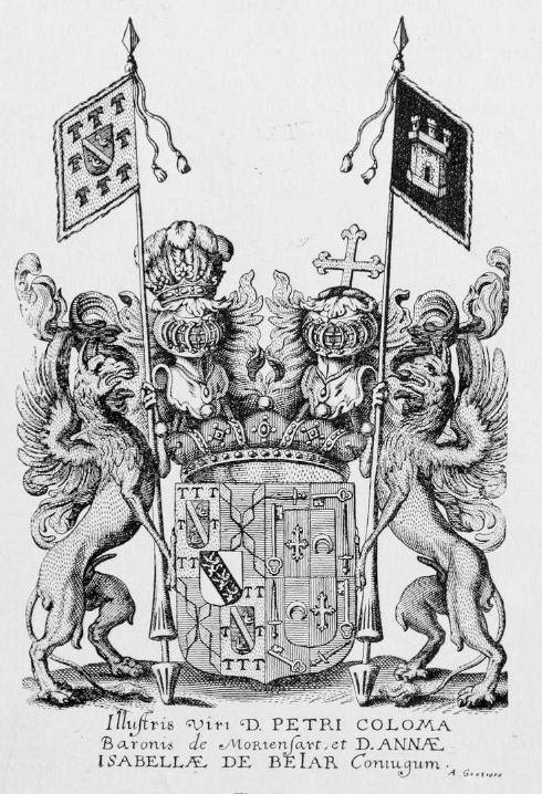 Ex libris/Perdro Coloma, 1st Baron of Moriensart x Anne Elisabethe de Bejar, Lady of Westackerre.